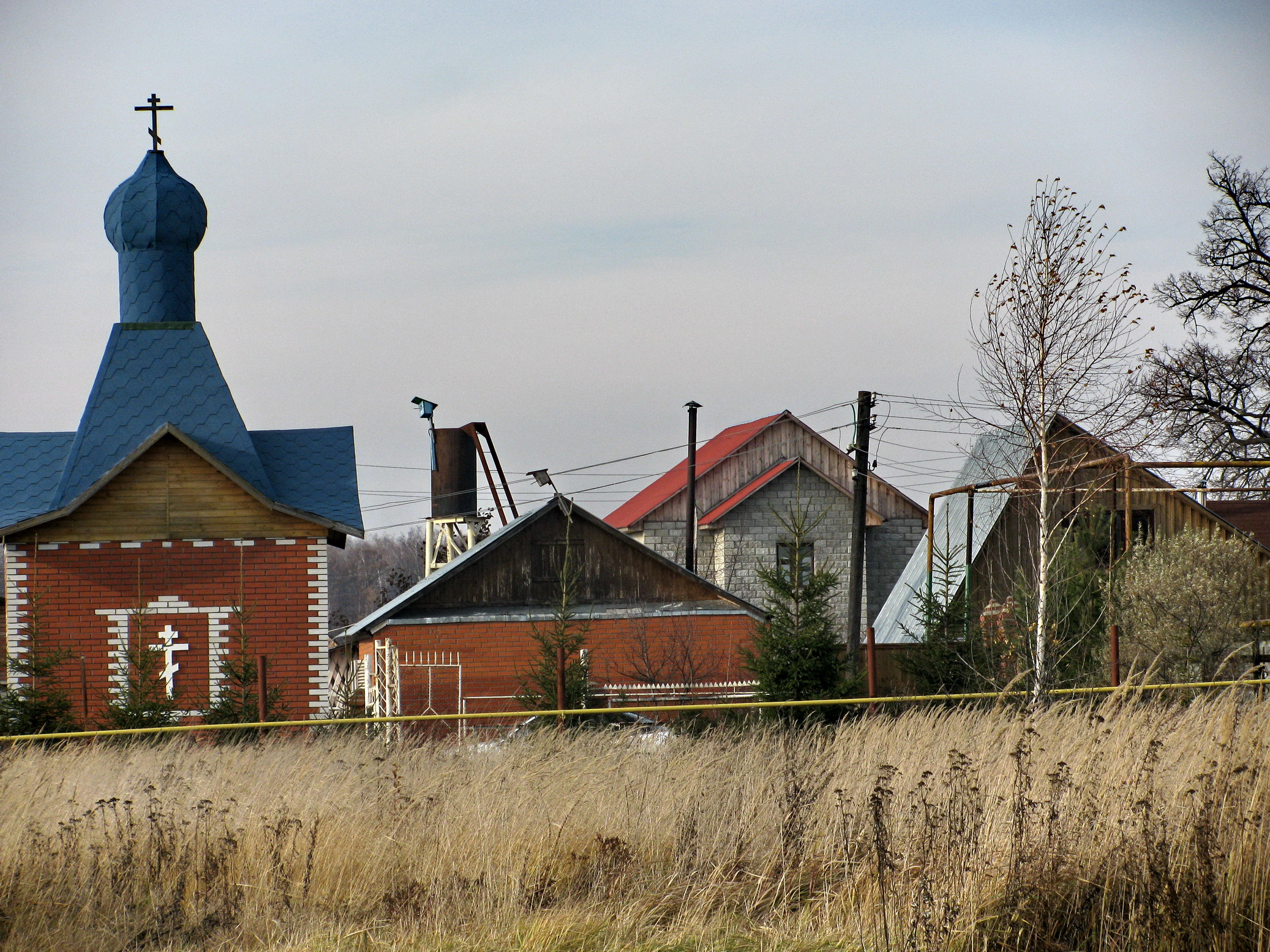 Тула. д.Пахомово - осенний пал. 01/11/2010г.